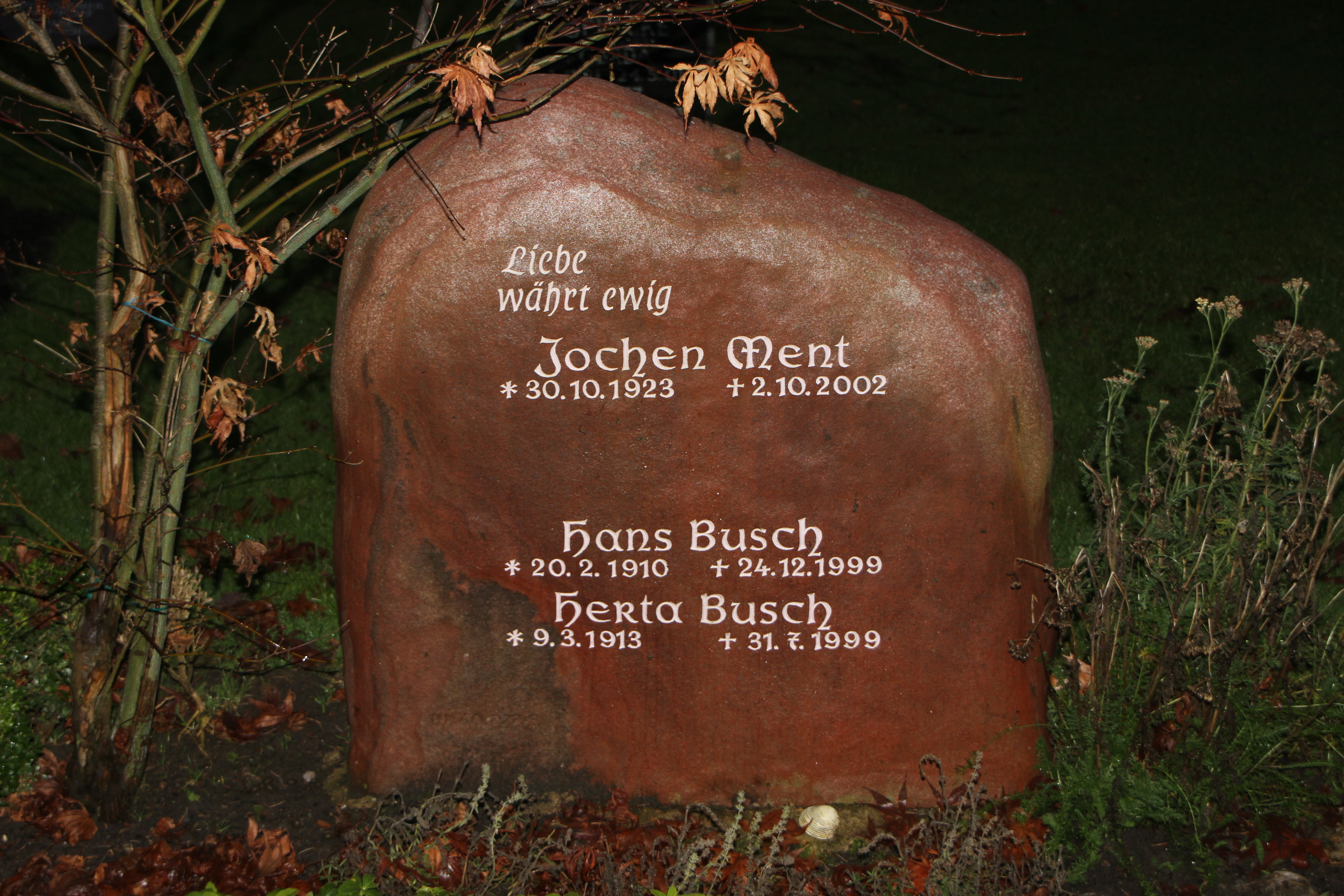 Hans Joachim (Jochen) „Jo“ Ment (* 1923 in Hamburg (Barmbek); † 2002 in Hamburg) war ein deutscher Bandleader, Komponist, Arrangeur, Musiker (Bandoneon, Saxophon) und der Vater des Radiomoderators John Ment.